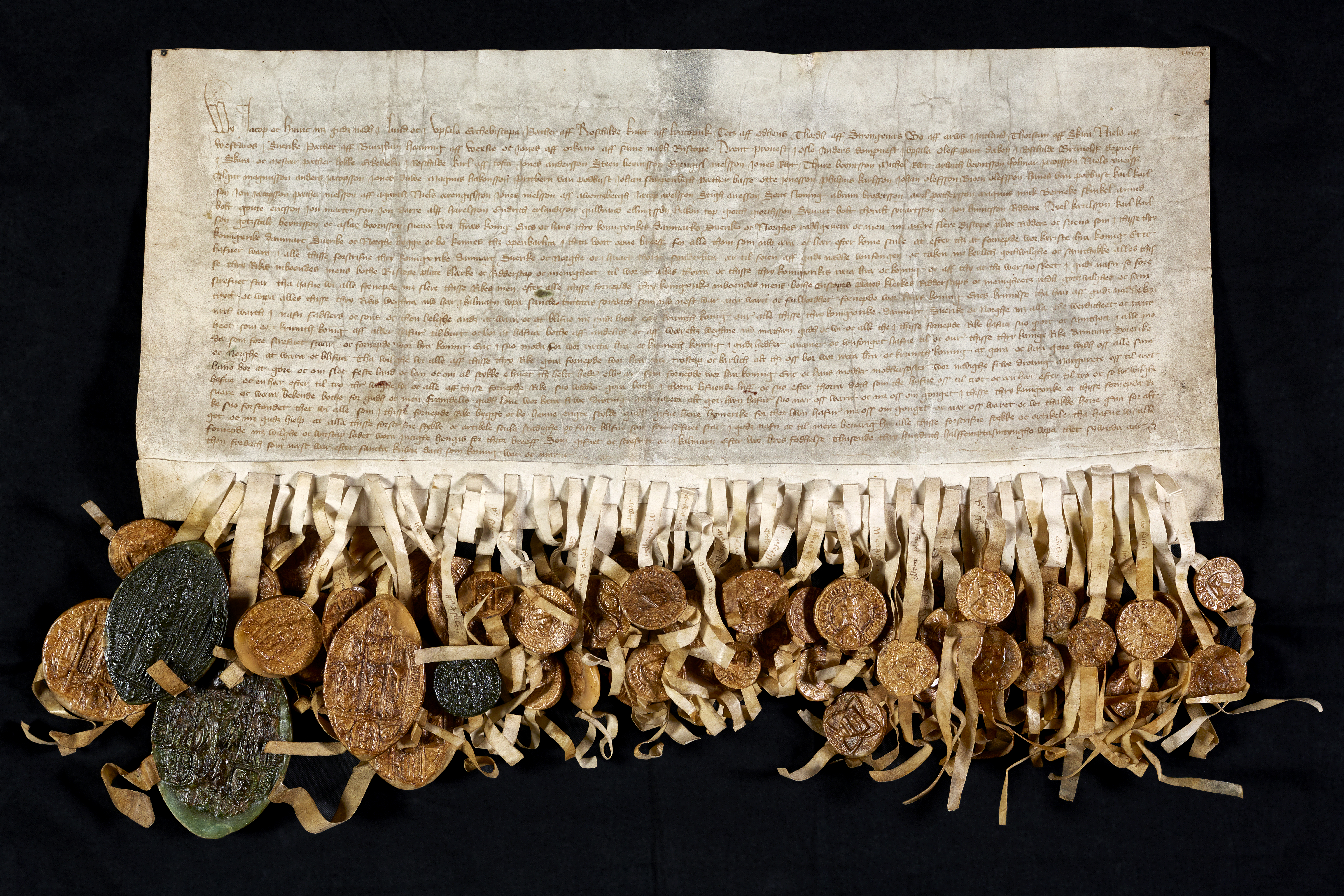 Crowning of king Eric of Pommerania